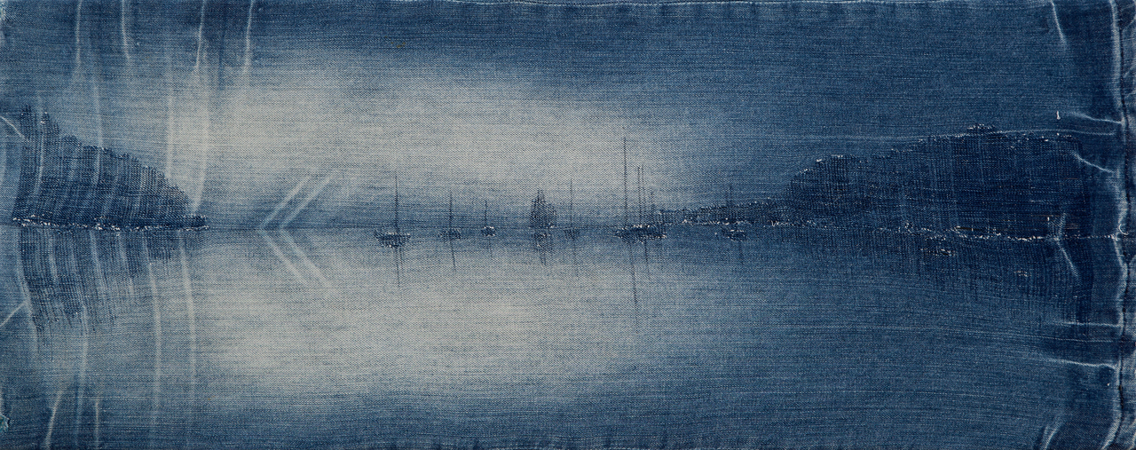 František Matoušek, Benirrás, vypáraná riflovina, 35X90 cm (2014)